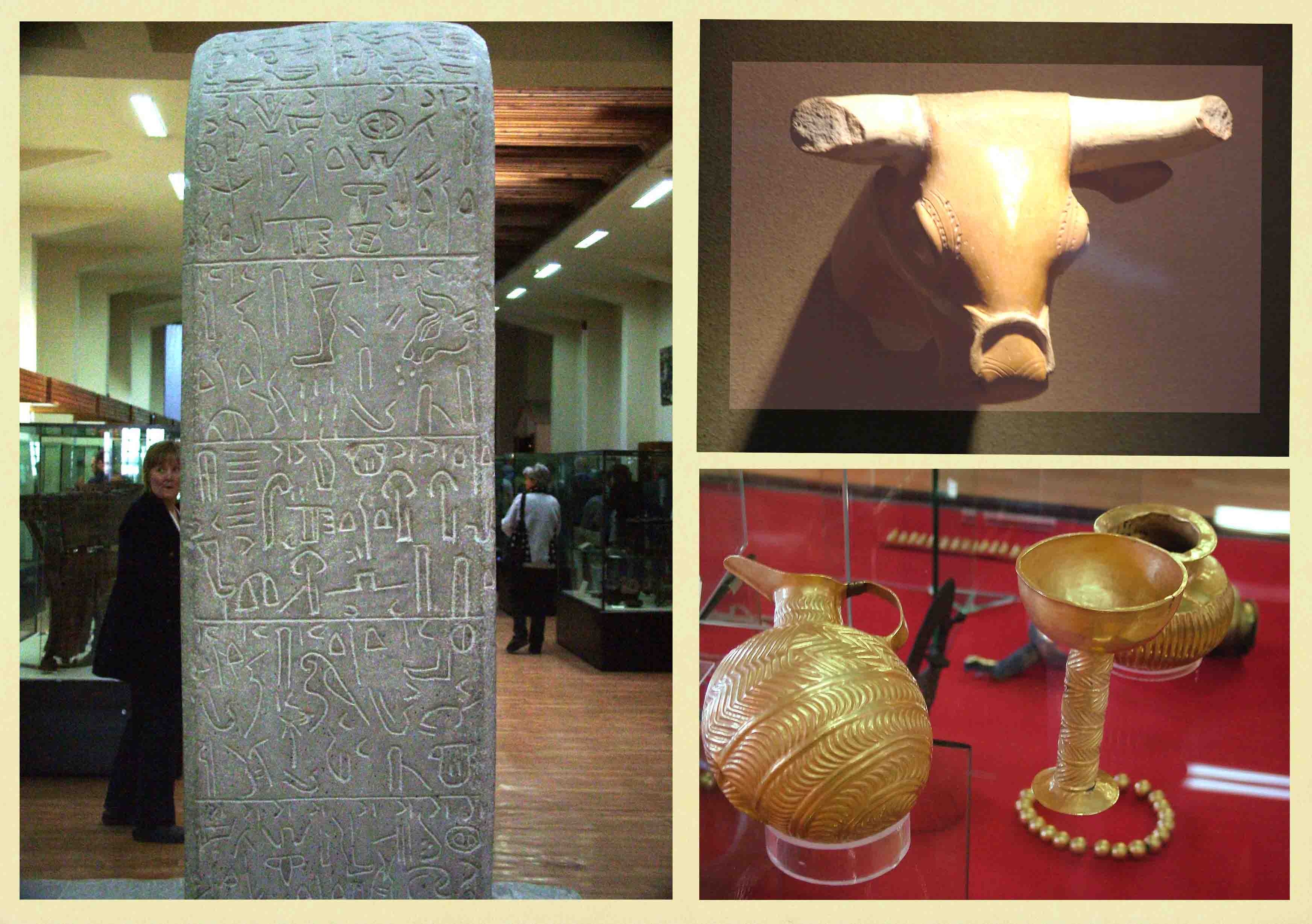 Neolit- és bronzkori leletek az Anatóliai Civilizációk Múzeumában, Ankara, Törökország